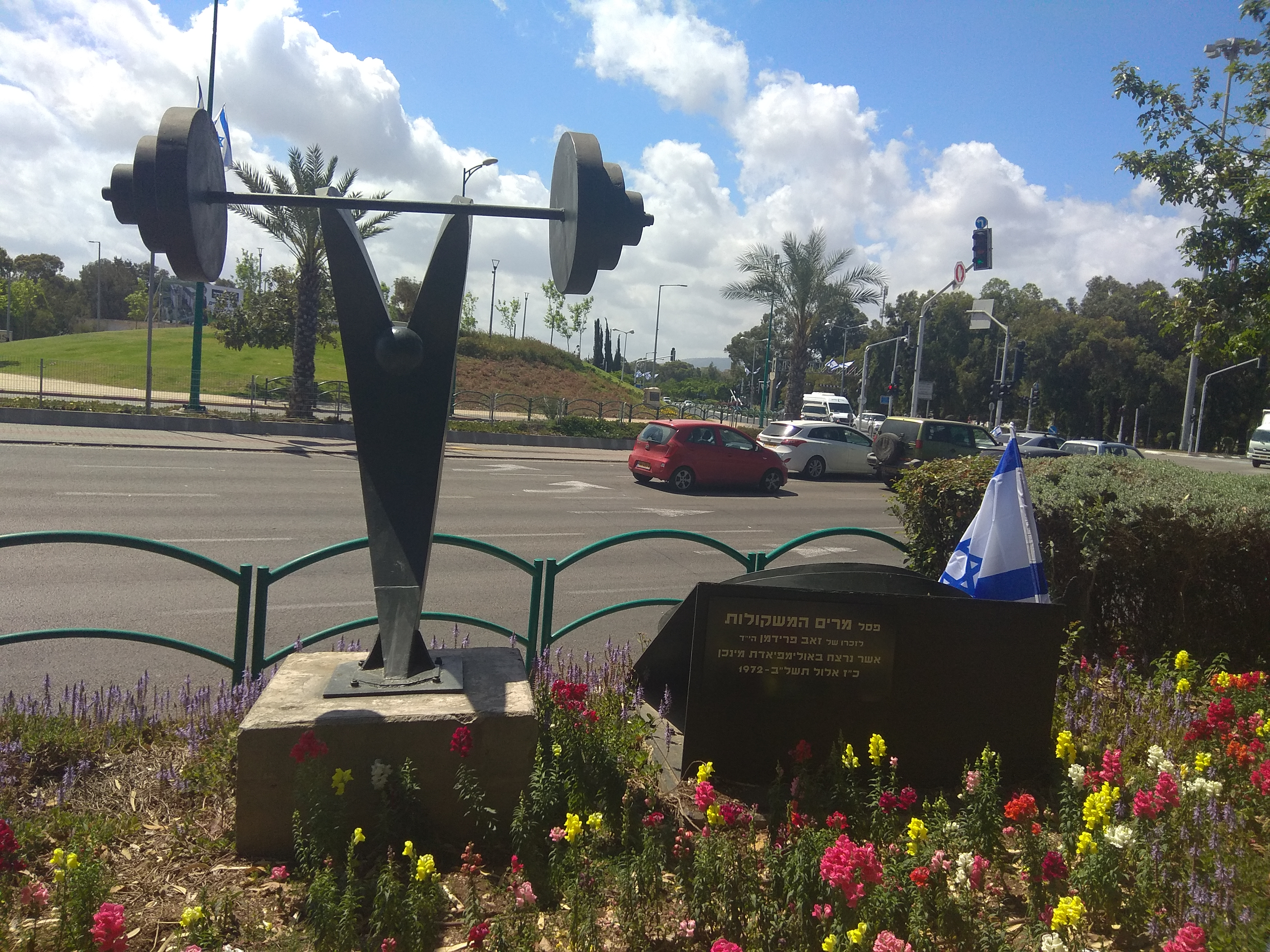 אנדרטה לזכר זאב פרידמן